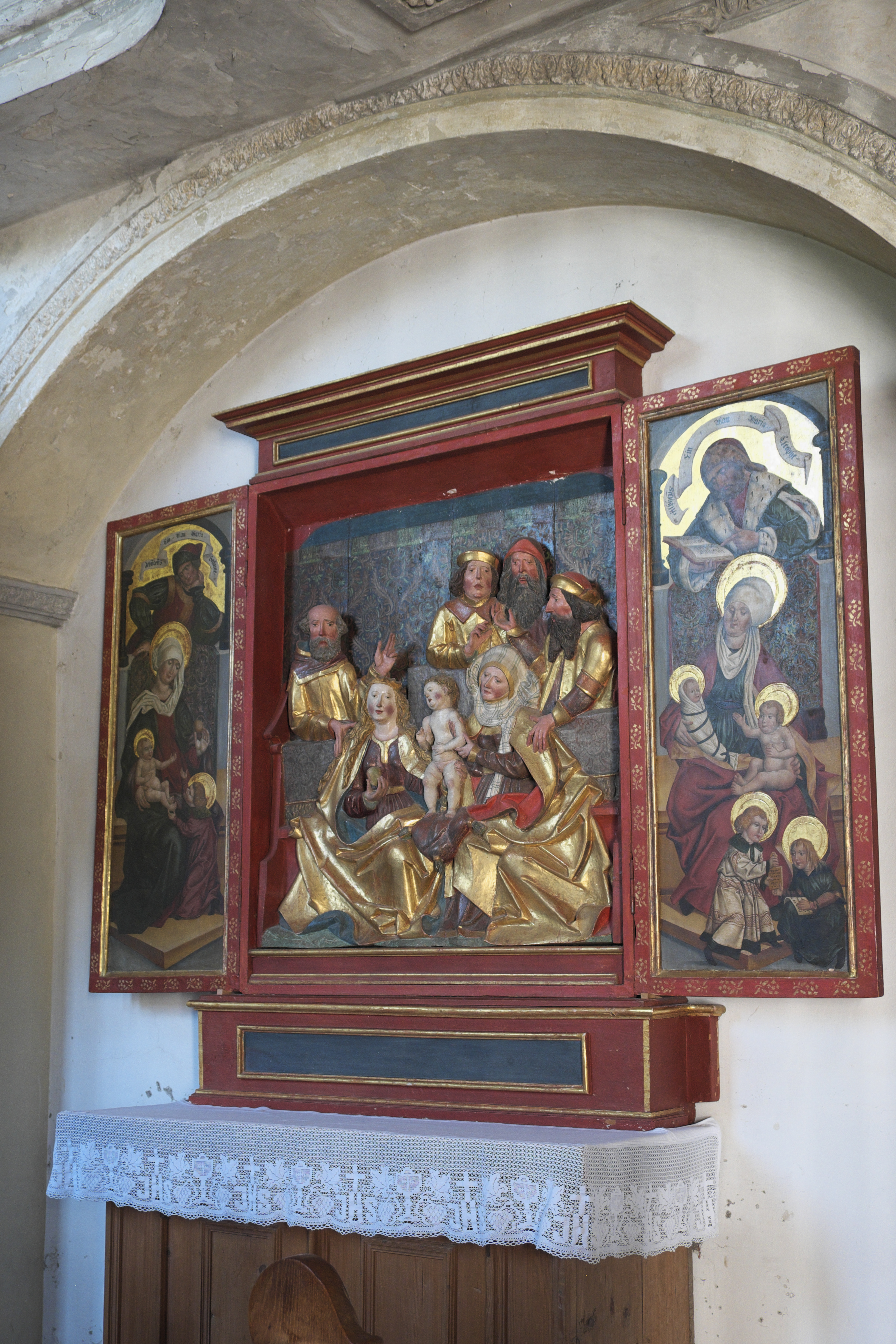 Katholische Pfarrkirche St. Martin, ehemalige Augustinerchorherrenstiftskirche, in Bernried am Starnberger See im Landkreis Weilheim-Schongau (Bayern/Deutschland), Flügelaltar der Münchner Schule, um 1490/1500, Darstellung: Heilige Sippe